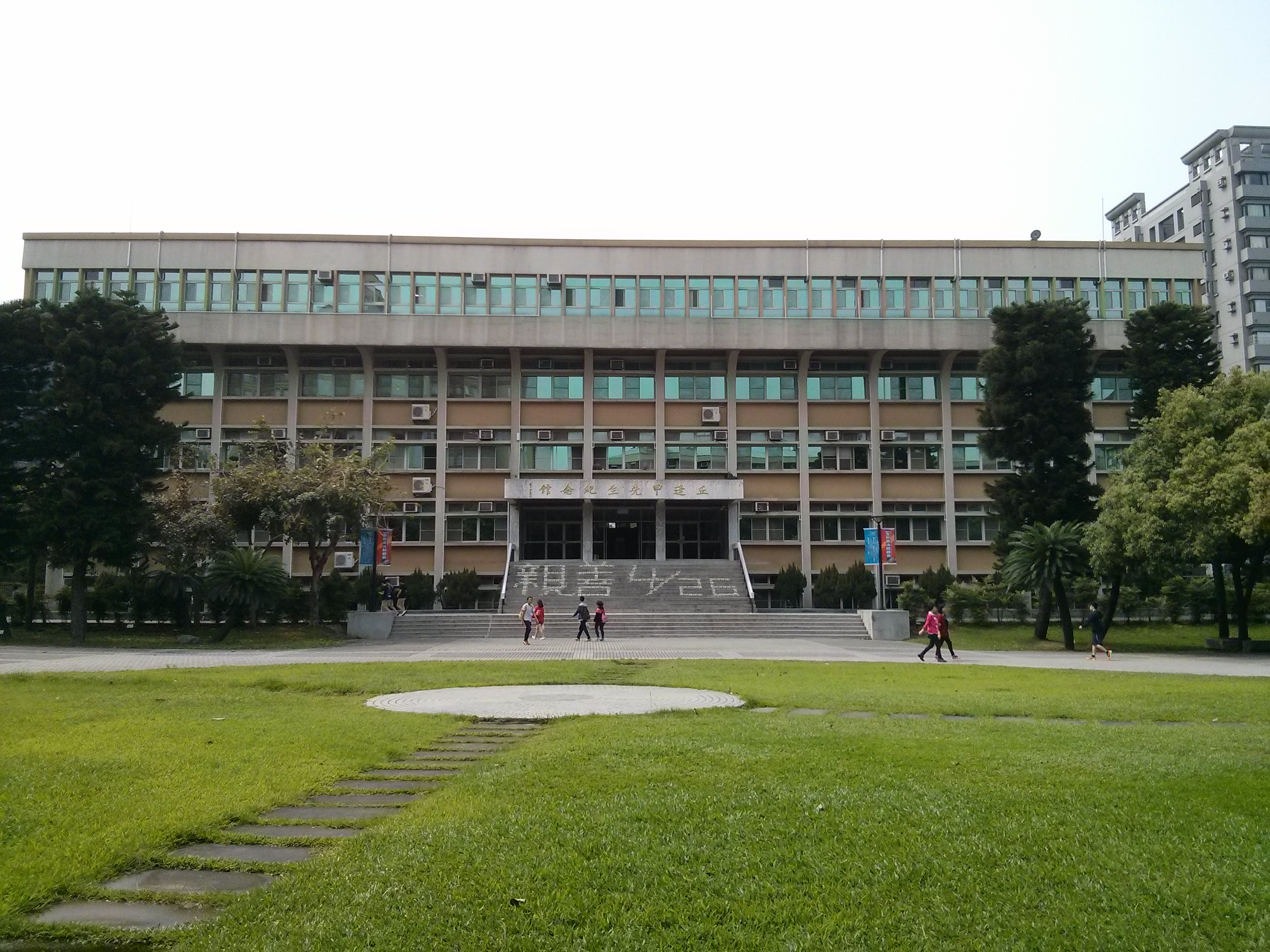 逢甲大學丘逢甲先生紀念館